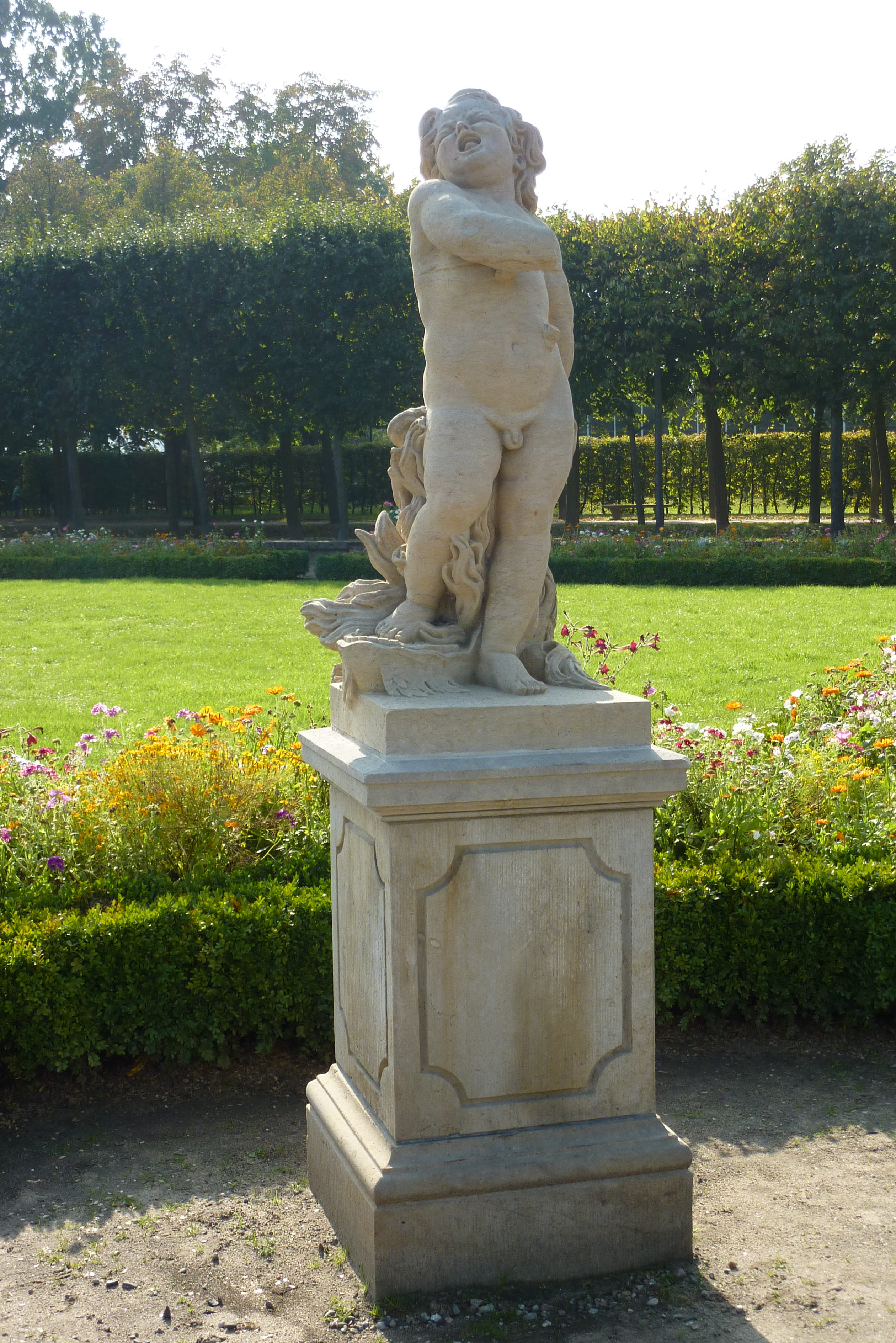 Skulptur „Choleriker“ der „Vier Temperamente“ nach Gottfried Knöffler, Südwestposition im nördlichen Rondell des Schlossgartens im Tierpark Berlin (Friedrichsfelde). Kopie von Rolf Winkler und Heinz Worner aus dem Jahr 1960.